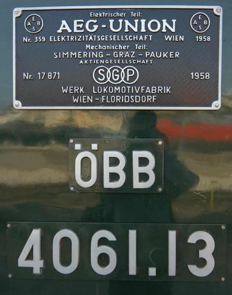 Typenschild einer in der Floridsdorfer Lokomotivfabrik gefertigten Lokomotive